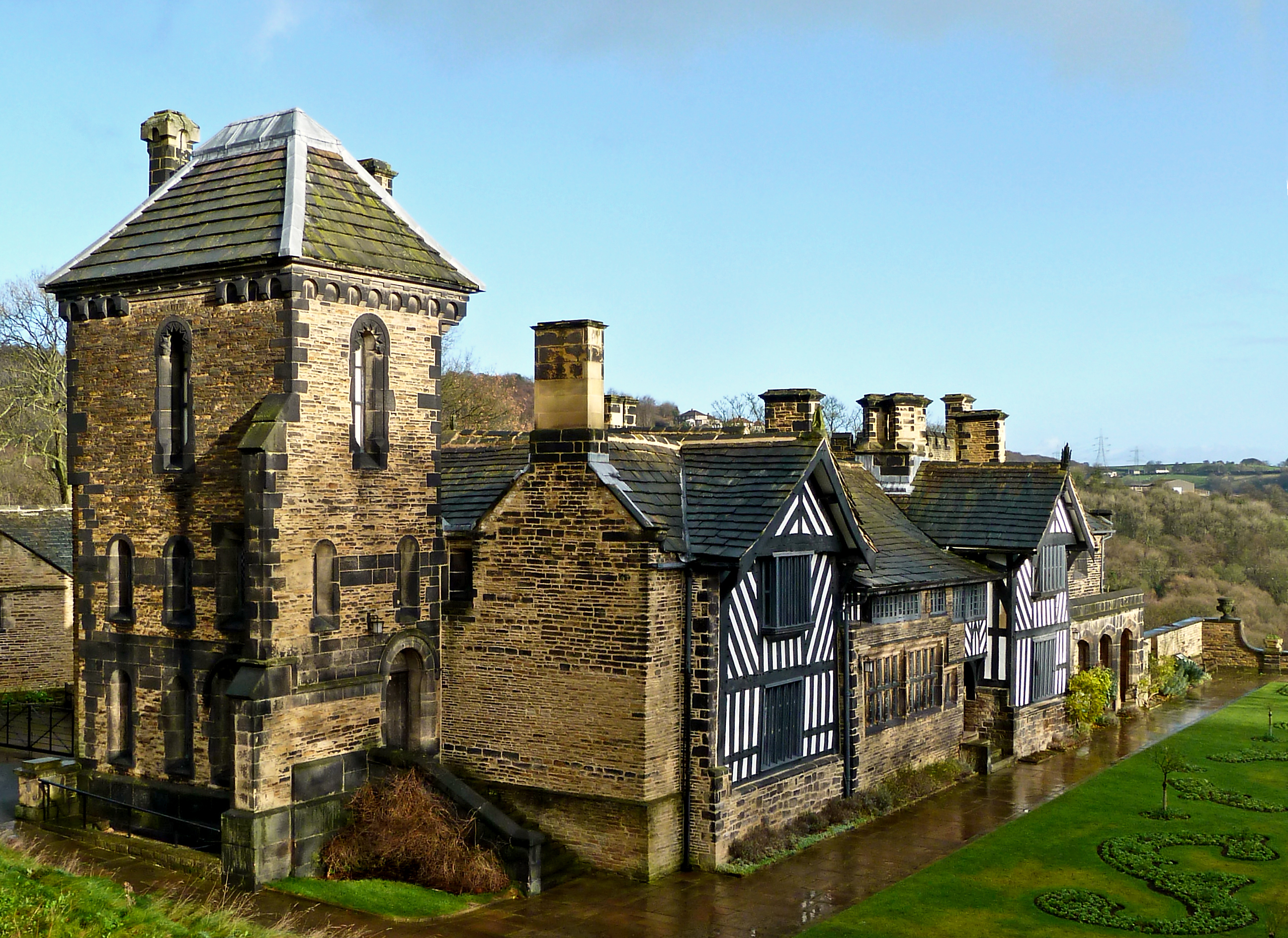 under a deceptively blue sky